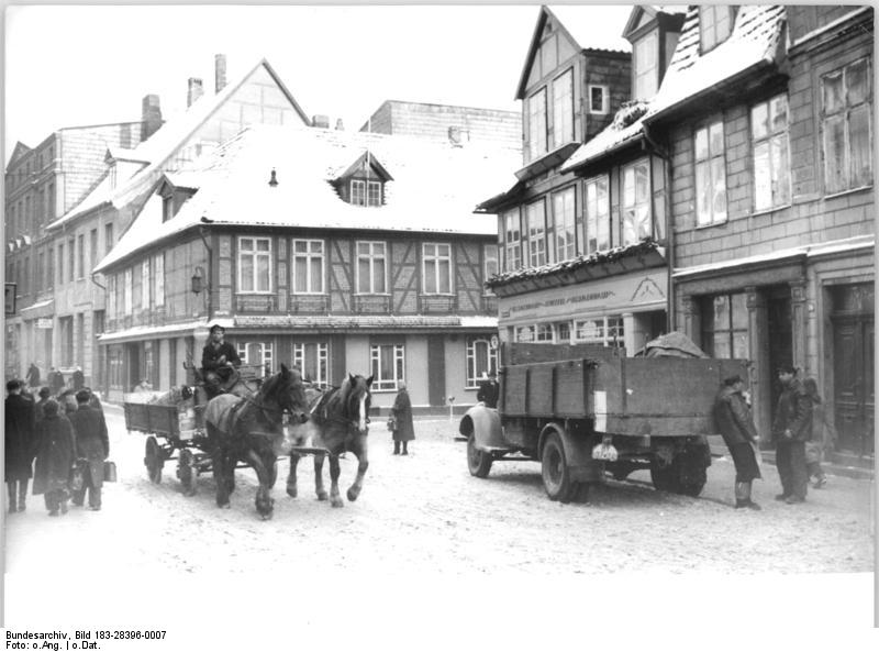 Schwerin, Winter, Pferdefuhrwerk